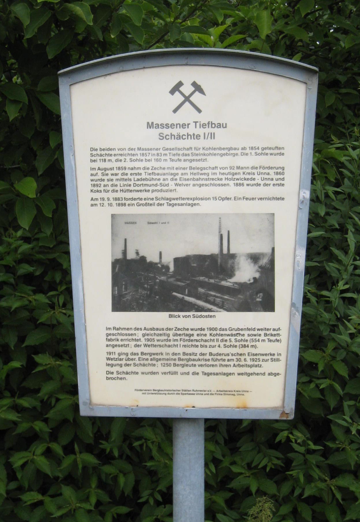 Bergbauhistorische Informationstafel zur Zeche Massener Tiefbau in Unna-Massen